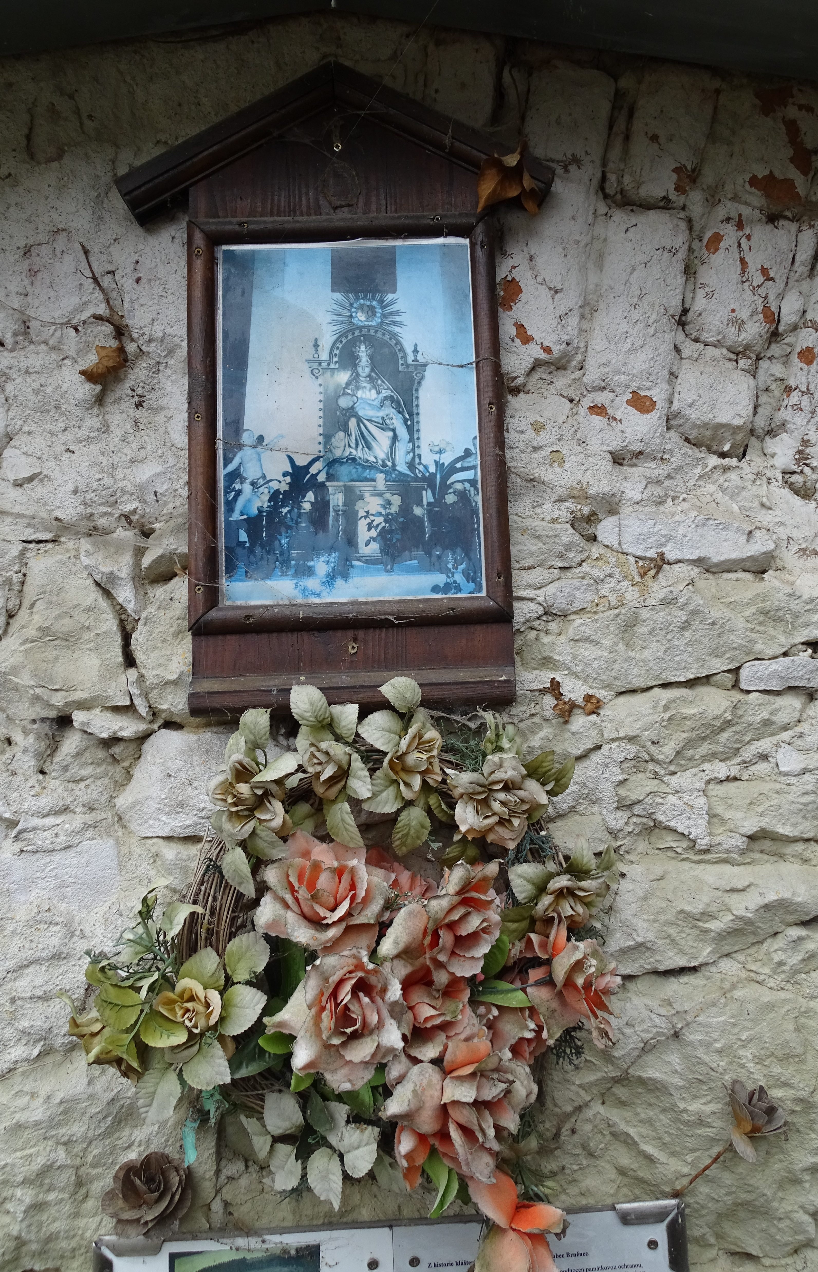 obrázek P. Marie v místech bývalého kláštera